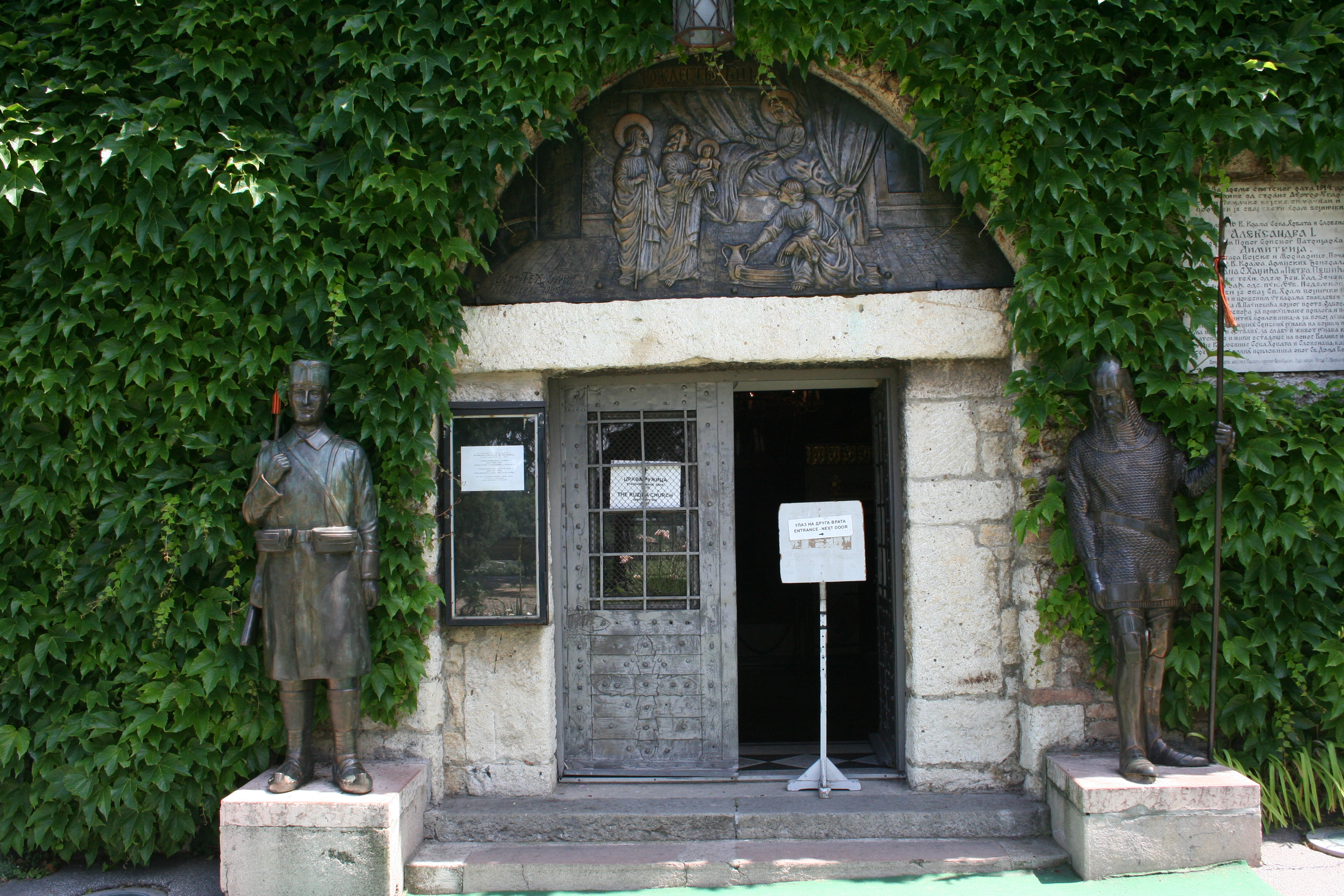 Улаз у цркву